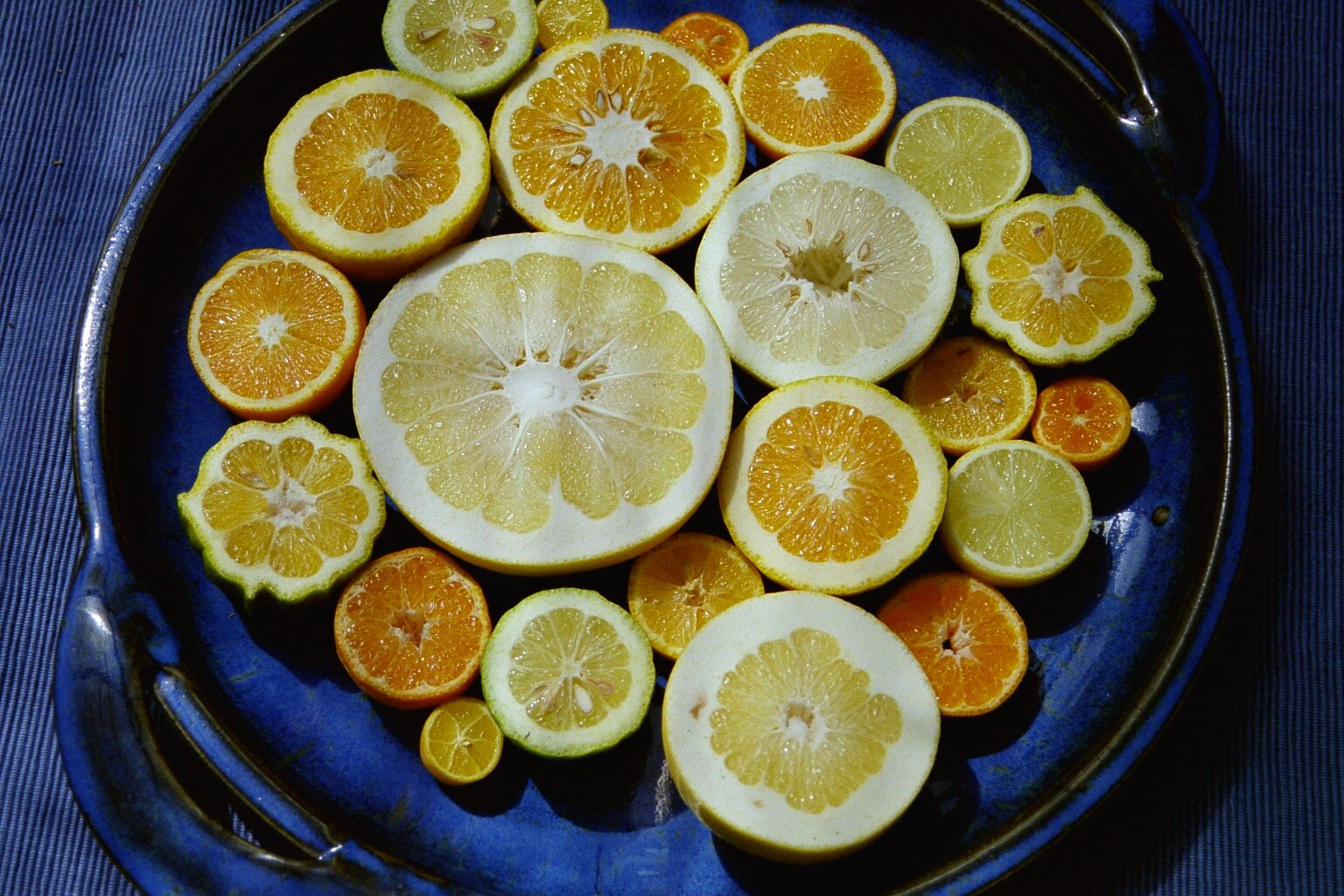 Querschnitt Citrusfrüchte von Limequat bis Pomelo